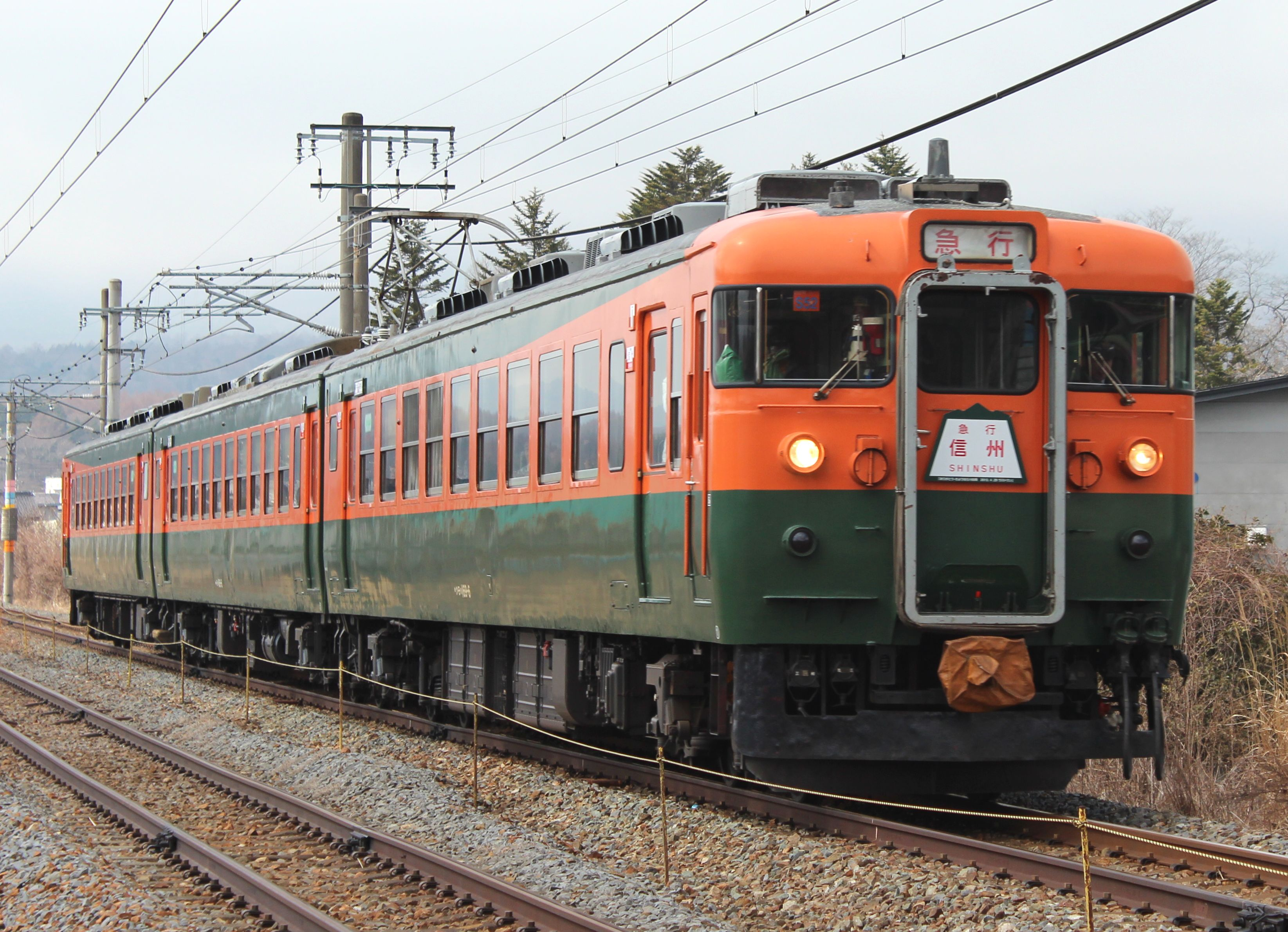 リバイバルトレイン急行「信州」